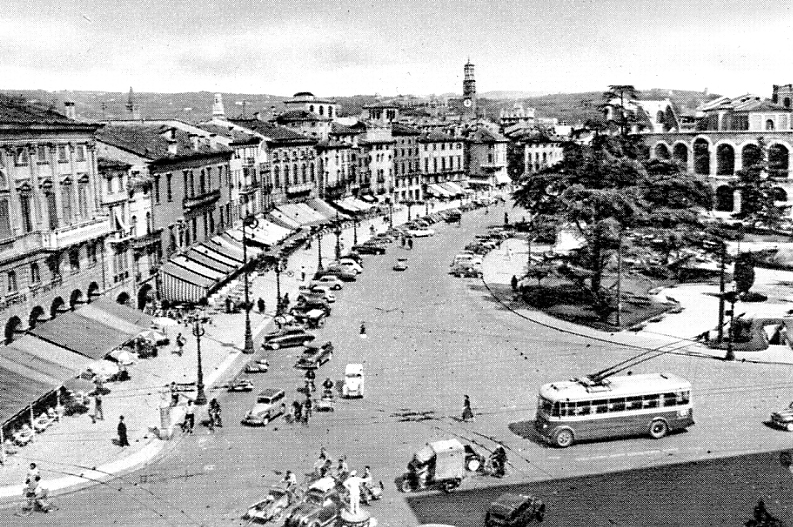 Piazza Brà a Verona in una foto degli anni 1950